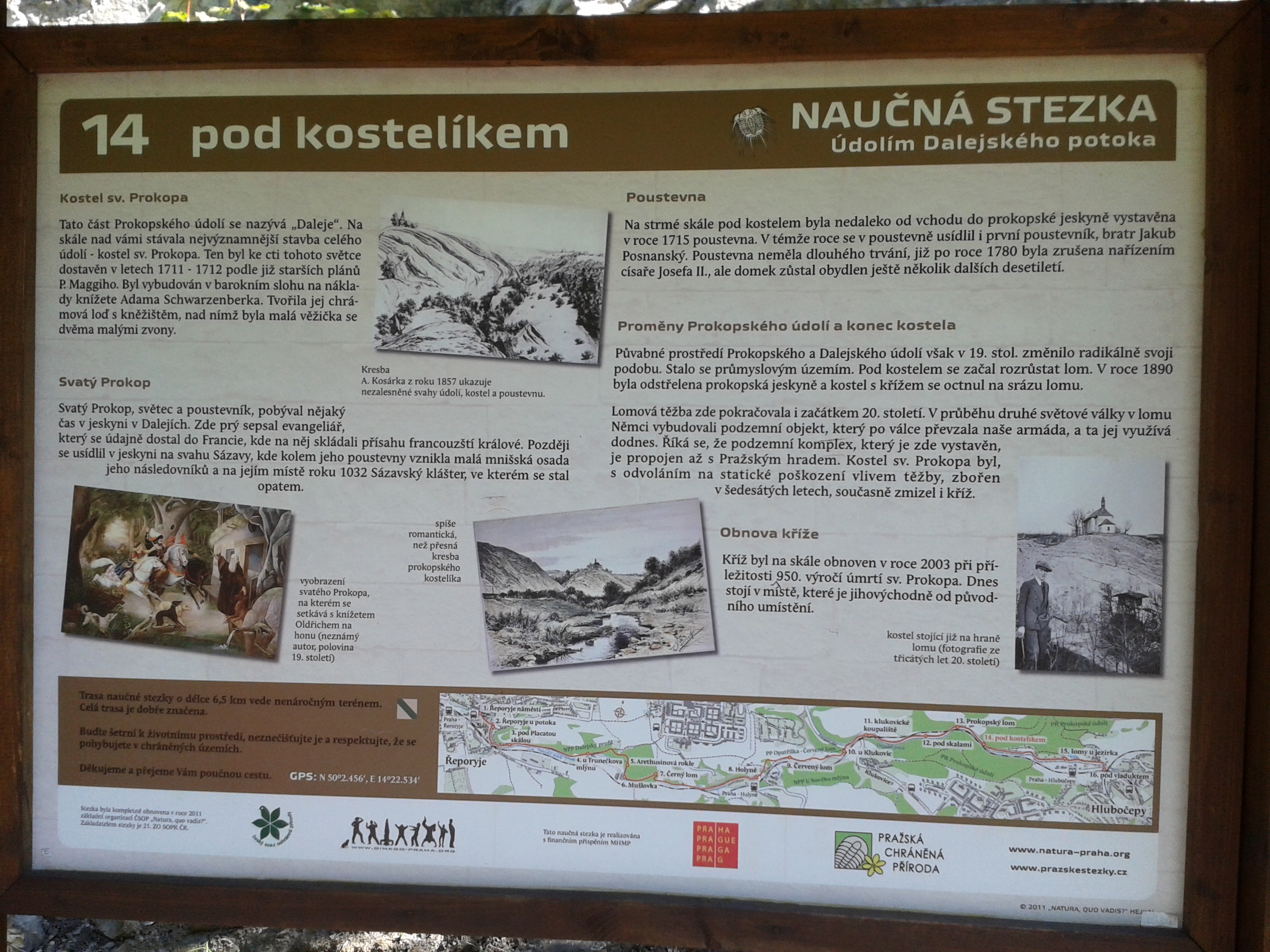 Veřejně přístupná informační tabule: Naučná stezka Řeporyje - Hlubočepy; Údolím Dalejského potoka; Pod kostelíkem; zastavení 14. Umístění zastávky: u silnice, pod skálou, na níž je umístěn velký dřevěný kříž. (GPS: N 50°2.456‘, E 14°22.534‘)